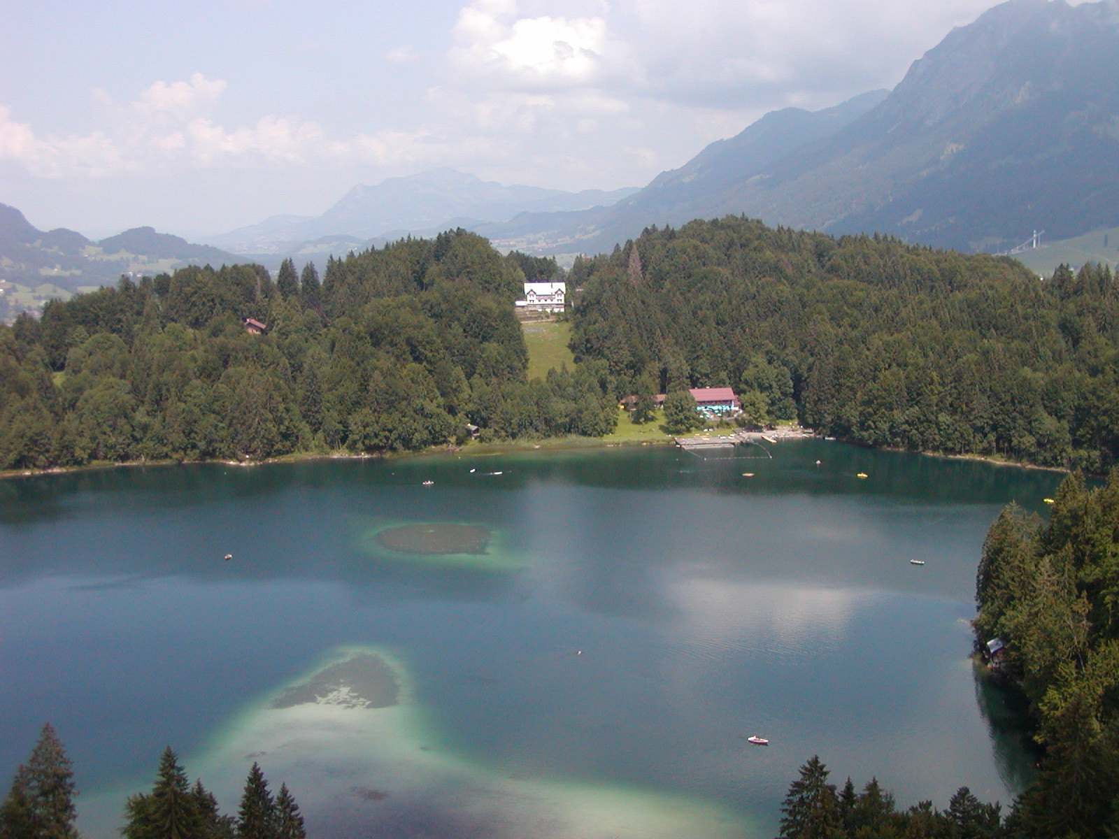 Blick von der Heini-Klopfer-Skiflugschanze auf den Freibergsee bei Oberstdorf.